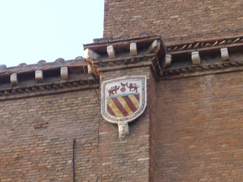 Roma, stemma dei Savelli sulla porta verso il Campidoglio di Santa Maria in Aracoeli